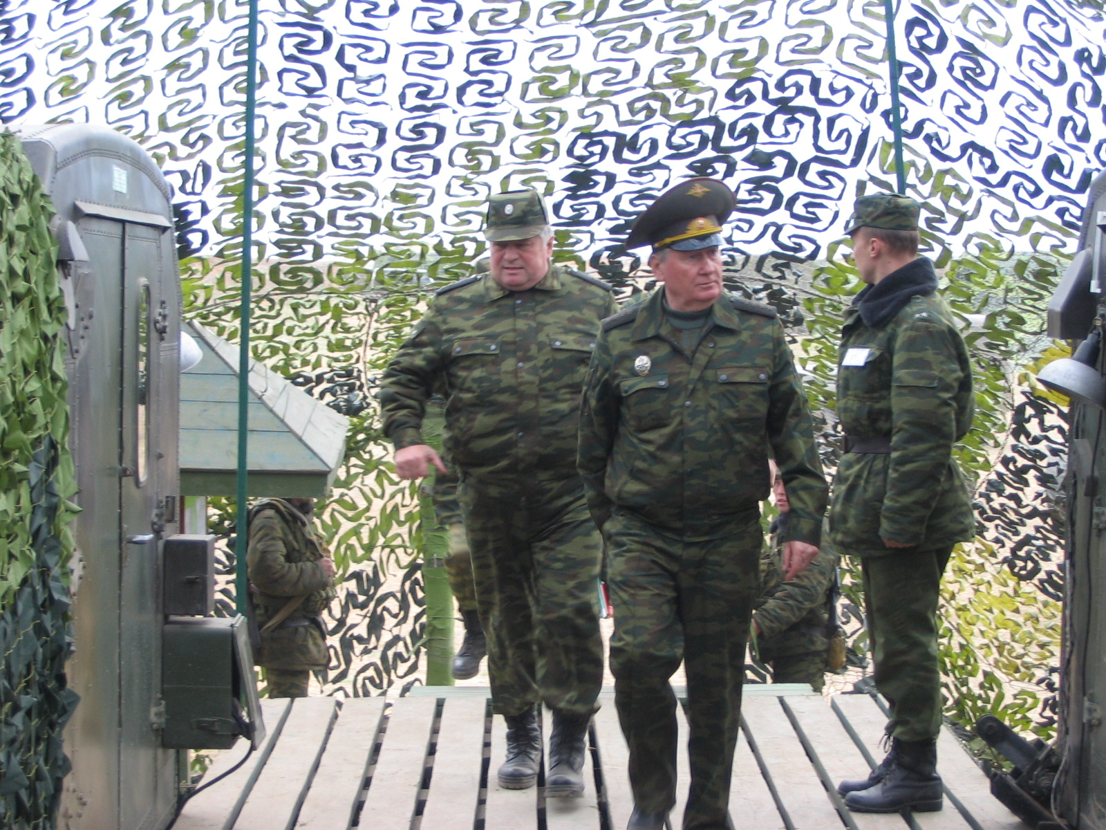 генерал армии Баранов на КП 58 армии